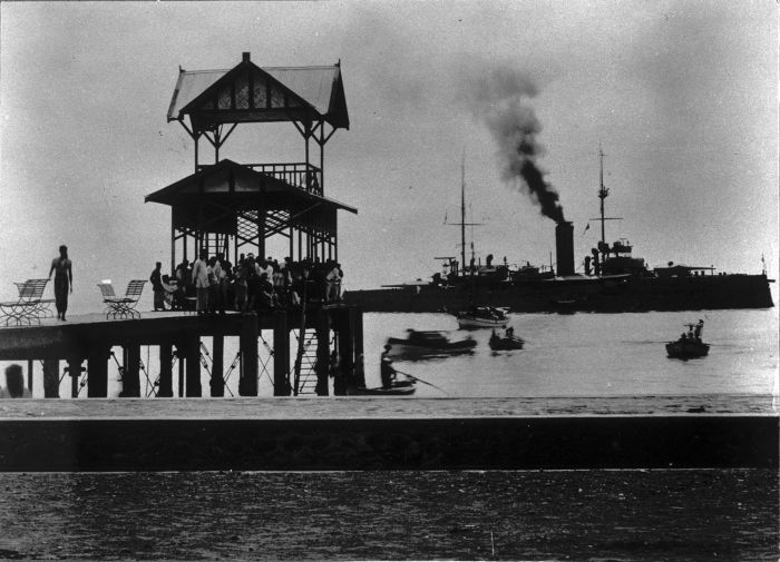 Foto. Bali, mailboot op de rede van Boeleleng.